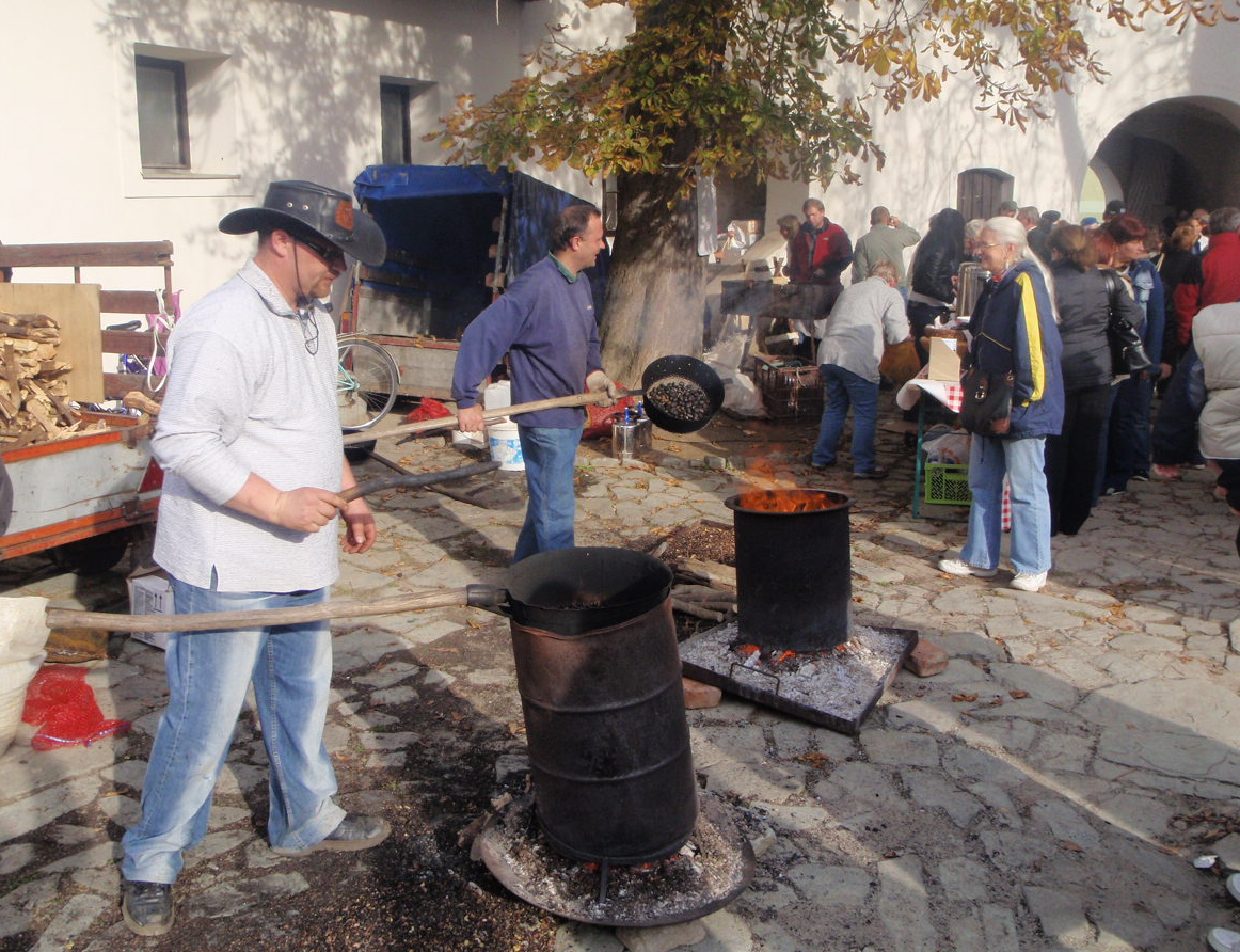 Maronifest in Güns